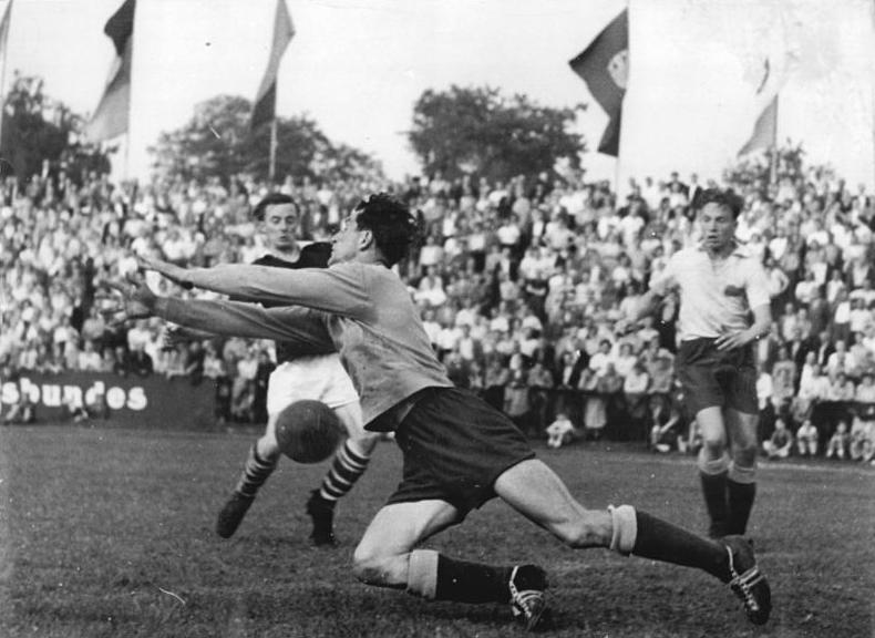 Zentralbild-Kister Wjt-Ku. 20.6.1955 FDGB-Pokal ging nach Karl-Marx-Stadt - Vor 18.000 Zuschauern holte sich der "Ewige Zweite", SC Wismut, beim Endspiel um den FDGB-Pokal gegen den SC Empor Rostock im Leipziger Bruno-Plache-Stadion nach zweimal 15 Minuten Verlängerung mit einem 3:2 Erfolg die Trophäe. UBz.: Vor dem Rostocker Tor: Schlussmann Leber muss mit vollem Körpereinsatz den Ball vor den anstürmenden Wismut-Spielern sichern."